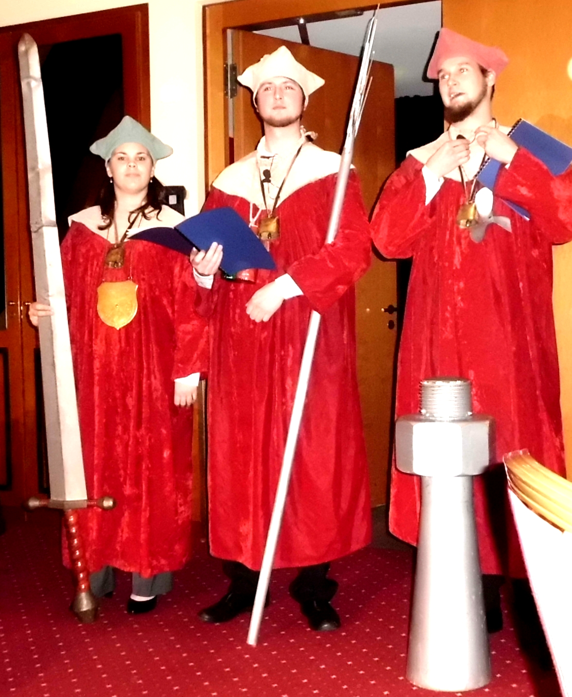 Das HOK der Heylige Frawe Latte zu Hammarburg an der Technischen Universität in Harburg